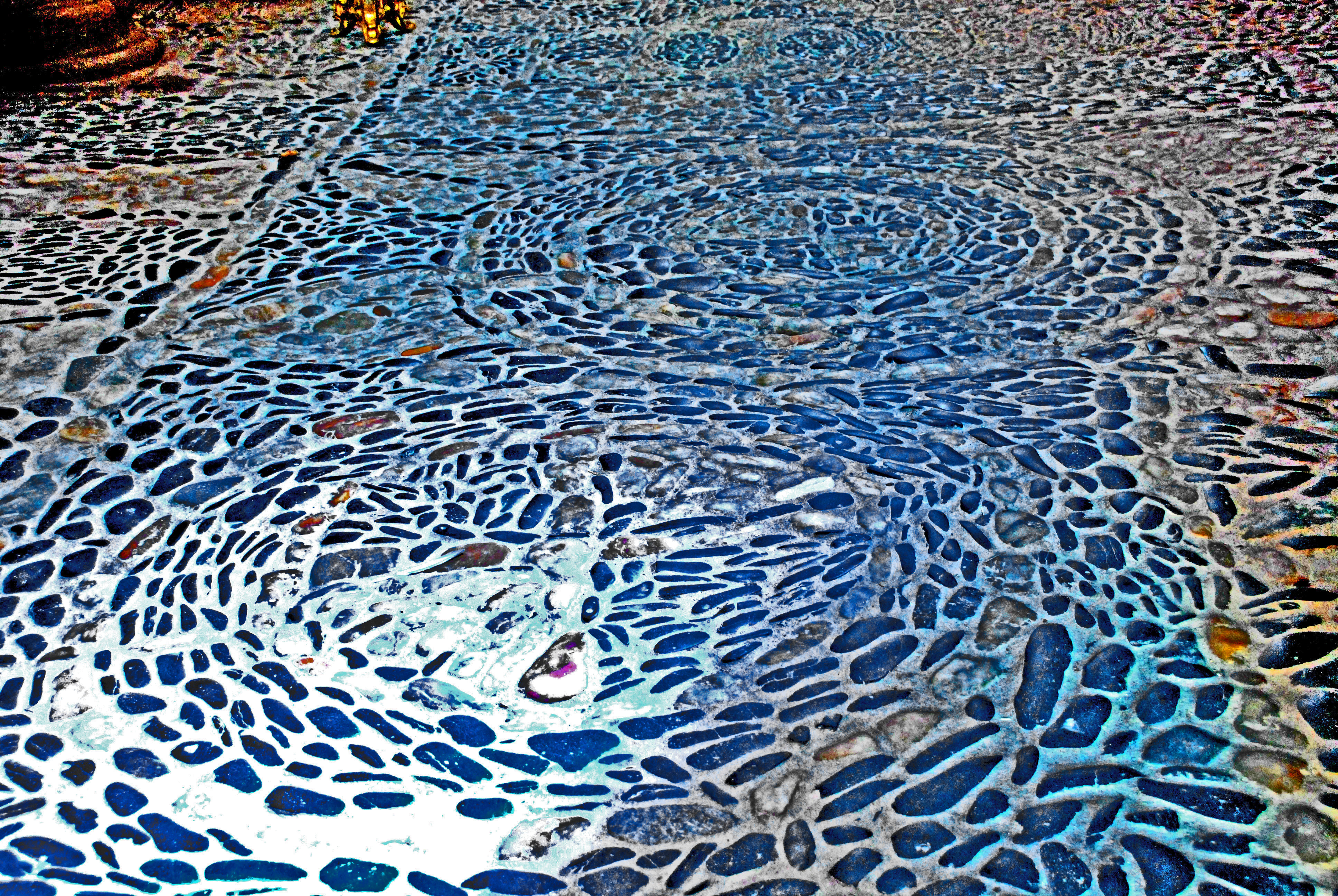 St.-Julien Brioude, Kieselsteinboden